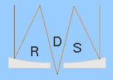 Logo des Rates deutscher Sternwarten